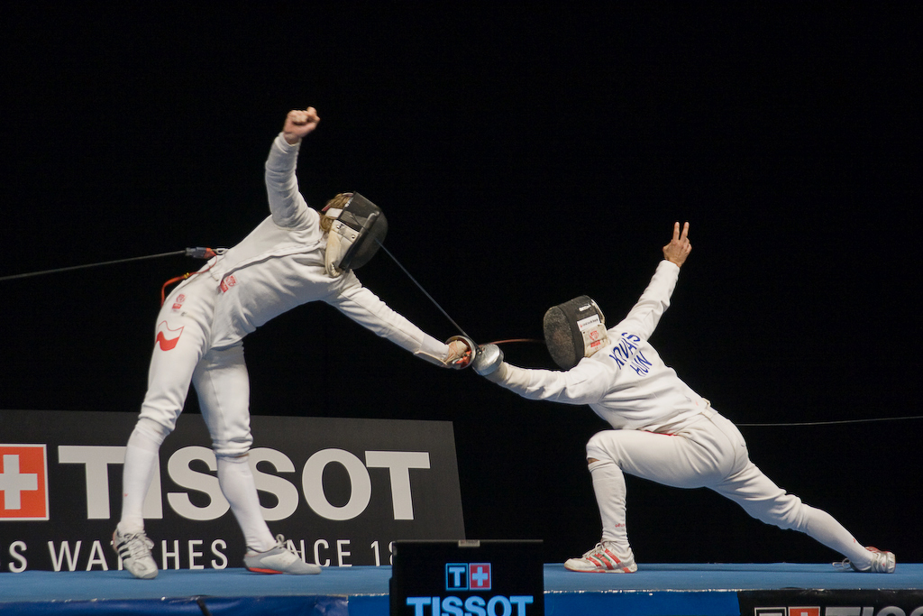 Prise le 7 juillet 2007 aux Championnats d'Europe d'escrime, à Gand (Flandre-Orientale) en Belgique.